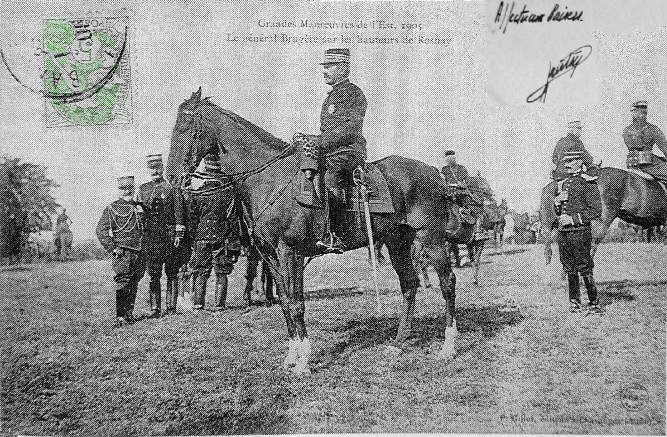 Le général Brugère sur les hauteurs de Rosnay pour les Grandes manoeuvres de l'Est.